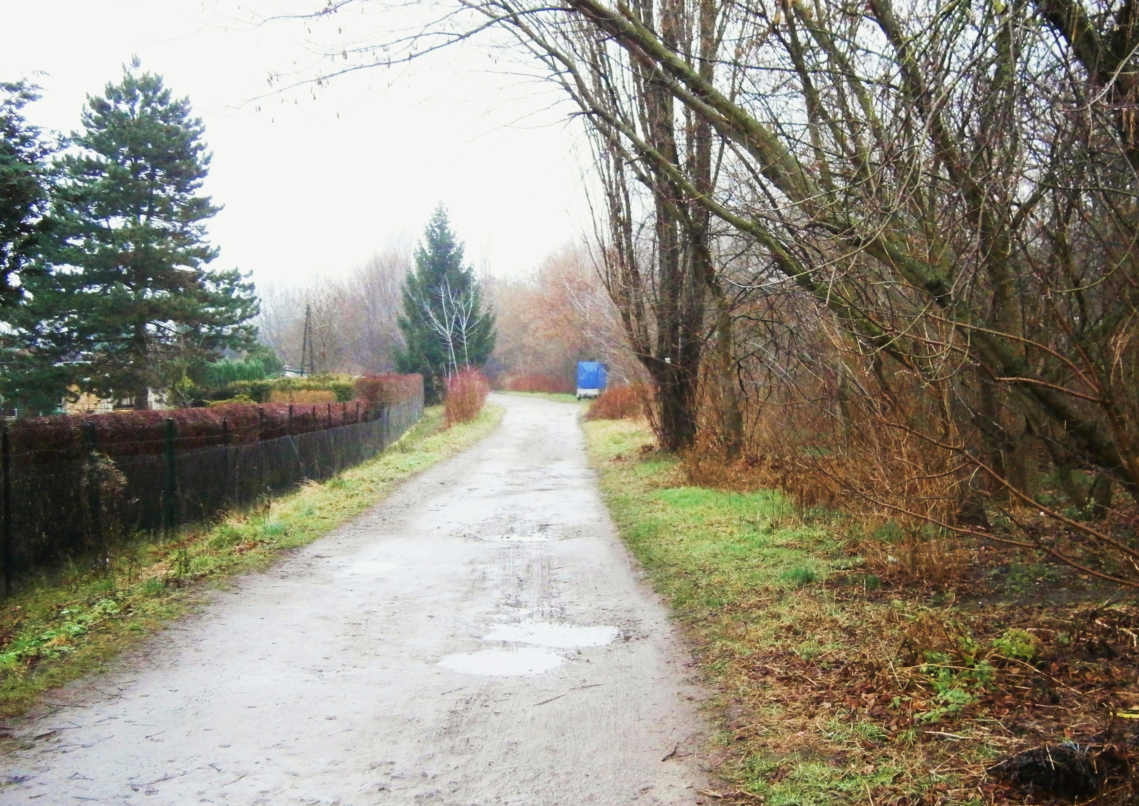 Die Friedenswegbrücke ist eine Brücke über den Nordgraben, sie liegt am Tripelpunkt der Ortsteile Blankenfelde, Rosenthal und Französisch Buchholz im Berliner Bezirk Pankow. Der Weg in Rosenthal am Südufer des Nordgrabens entlang nach Nordwest, hier verläuft die Humboldt-Spur (Nr. 16 der 20 grünen Hauptwege Berlins) .